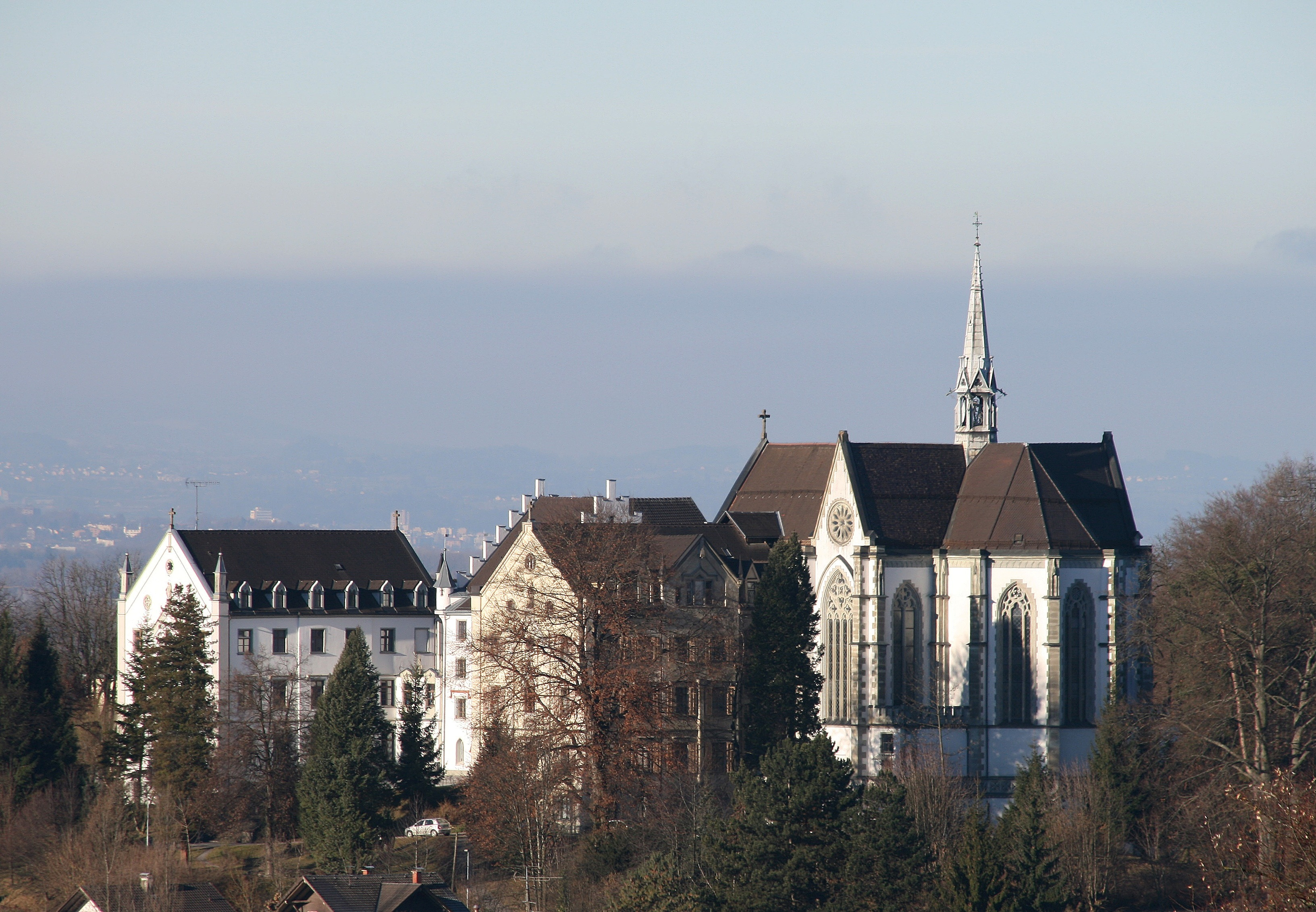 Kloster und Klosterkirche zum Heiligsten Herzen Jesu in Riedenburg mit Sacré Coeur Bregenz Riedenburg Privatgymnasium und Höhere Lehranstalt für wirtschaftliche Berufe. Arlbergstrasse 88-96 in Bregenz, Vorarlberg.